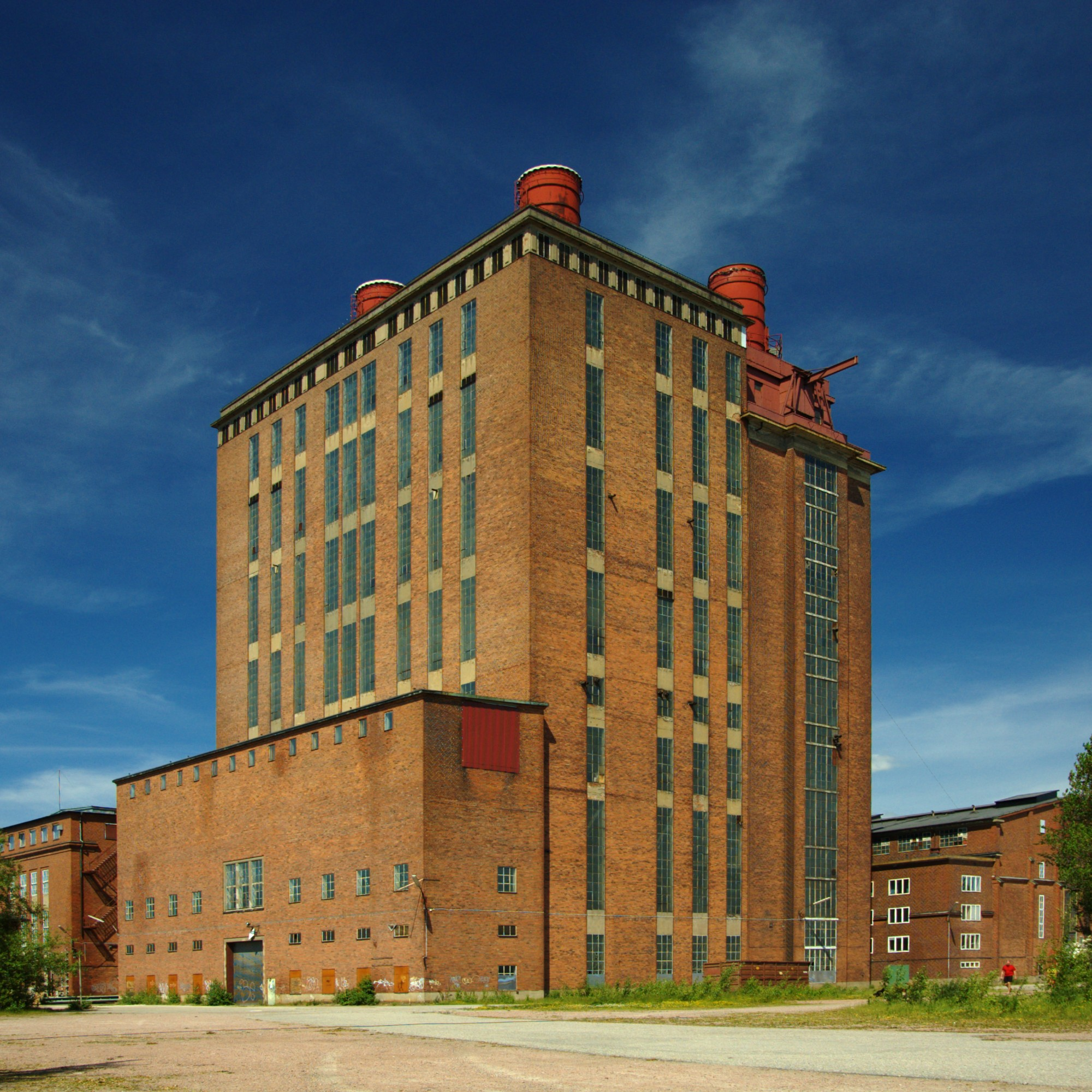 Västerås gamla ångkraftverk, Västerås